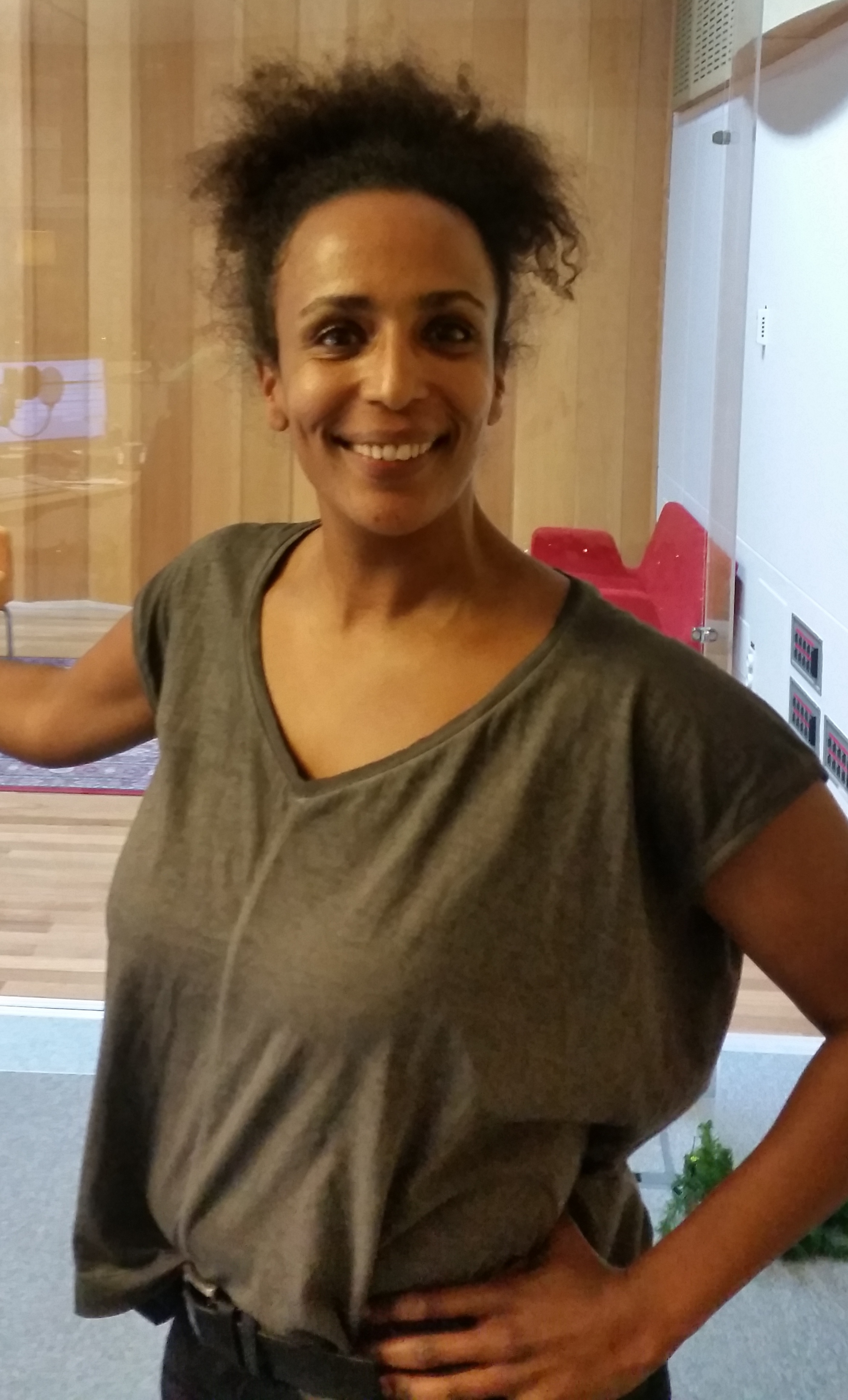 Marika Carlsson, programledare vid Sveriges Radio.